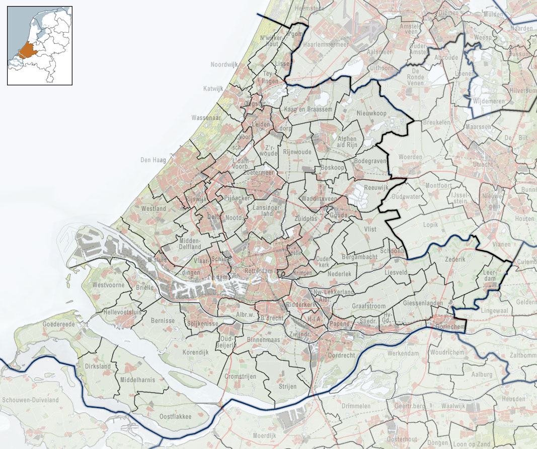 Referentiekaart van Provincie Zuid-Holland, met indeling van gemeenten (2010) en impressie van het landschap. Door Jan-Willem van Aalst, samengesteld uit publiek beschikbare geo-data: Referentie-ondergrond (kustlijn, steden, wegen) gerasterd uit de OpenStreet Map OSM. ( Inhoud is beschikbaar onder de Creative Commons Attribution-ShareAlike 3.0 license. Referentie-ondergrond op water bewerkt vanuit Gebruik is vrij met bronvermelding NLR en ESA. Vectorgrenzen van gemeenten en regio's vrij ter beschikking gesteld met dank aan cartografen van brandweerregio's Hollands-Midden en IJsselland; gerasterd in Photoshop. Hoogte-aanduidingen (reliëf) gerasterd uit de AHN Viewer ( gebruik is vrij met bronvermelding (c) AHN, Overige kenmerken op de kaart: eigen tekenwerk van Jan-Willem van Aalst, op basis van gerasterde gemeentegrenzen.